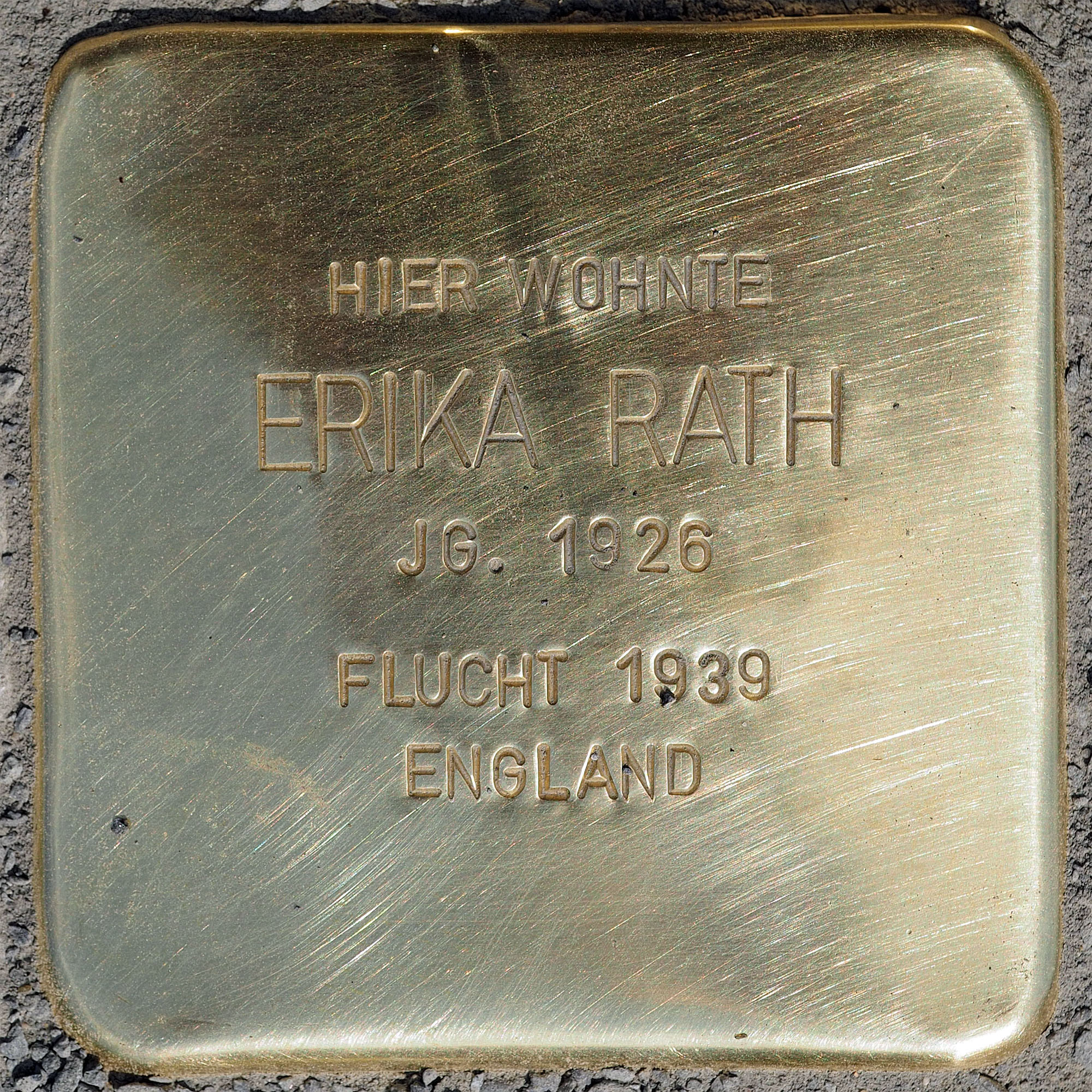 Stolpersteine Kempen: Rath, Erika